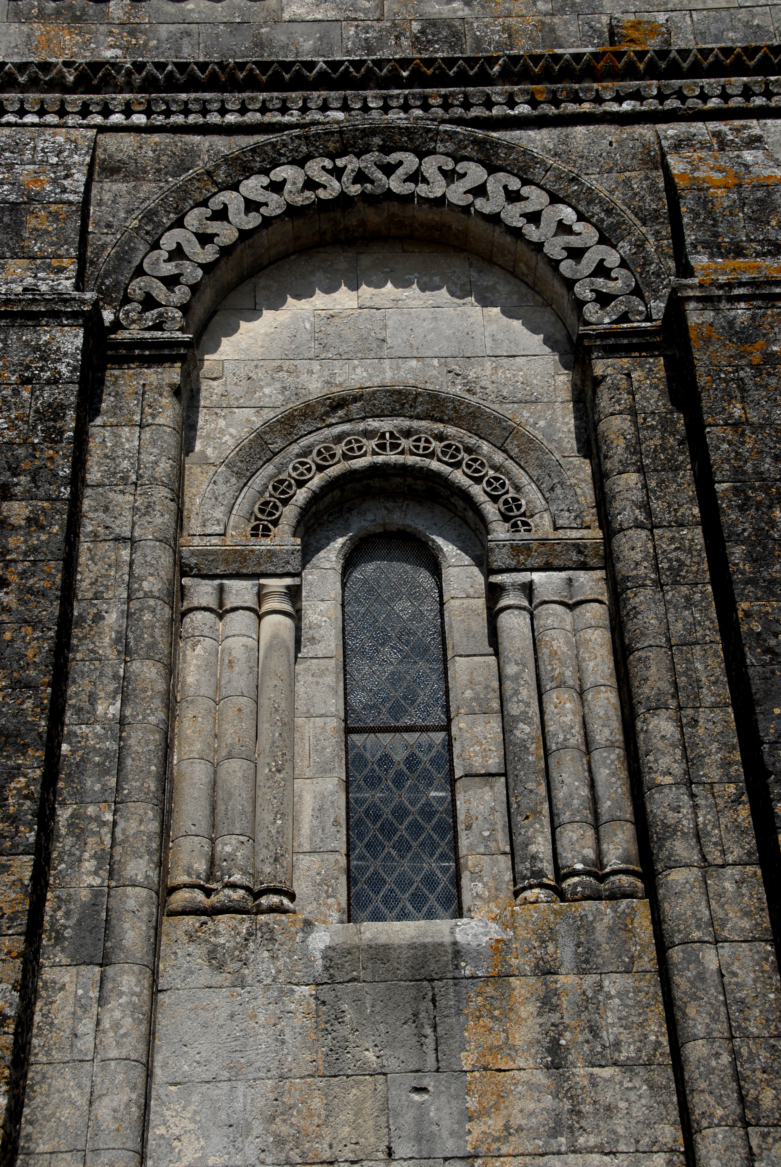 Chadenac, Arkatur, Längswand des Schiffs